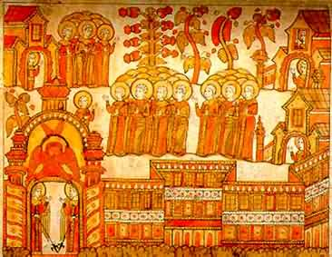 Heaven. Russian lubok.